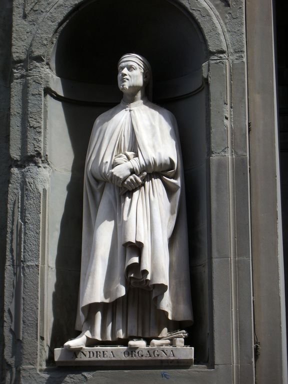 Andrea Orcagna